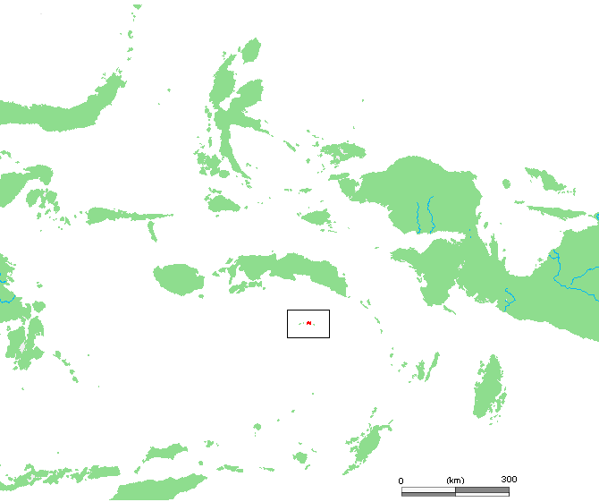 ID Banda.PNG